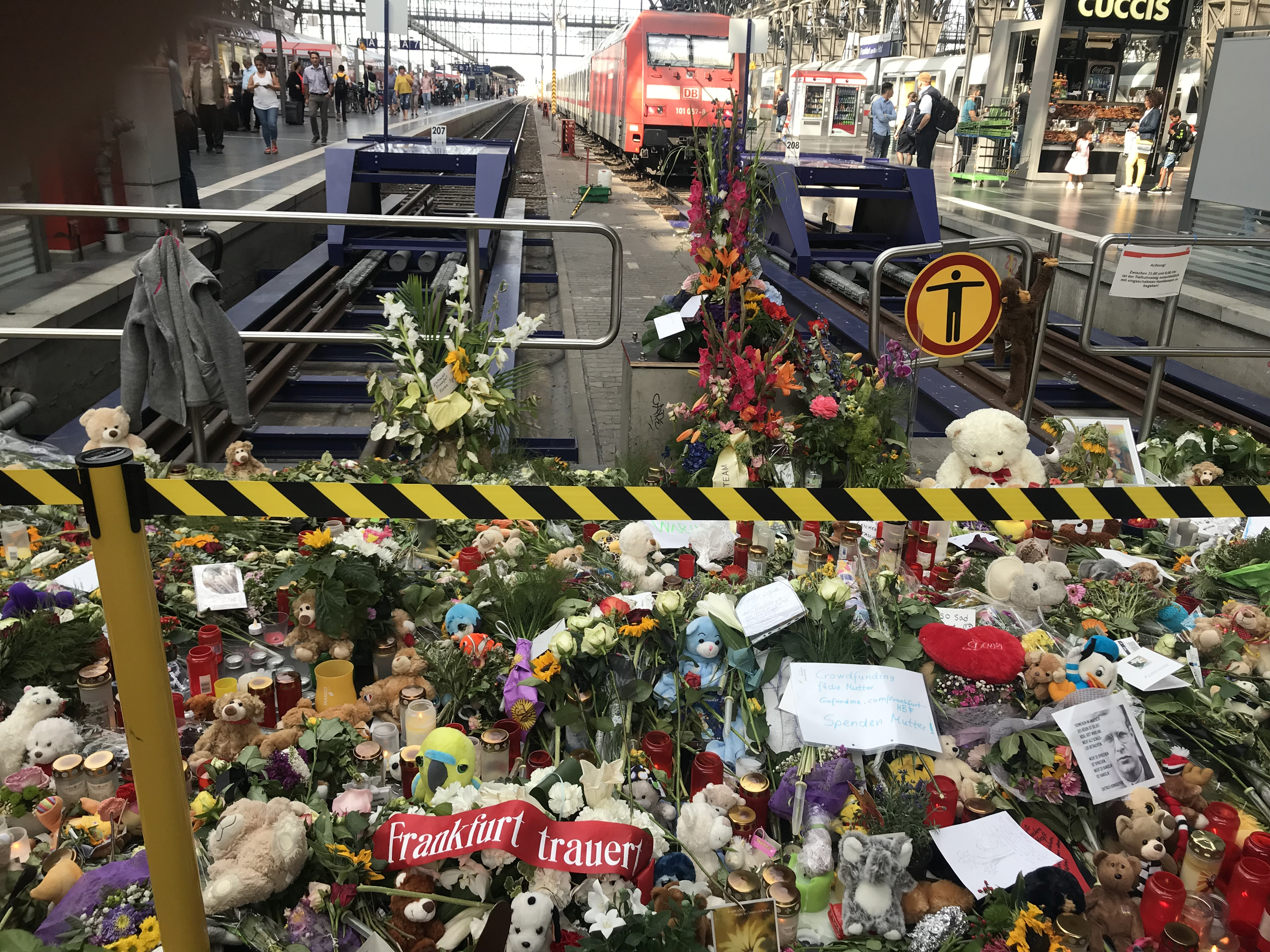 Frankfurt am Main, Hauptbahnhof, Gedenken an den am 29. Juli 2019 umgebrachten Jungen